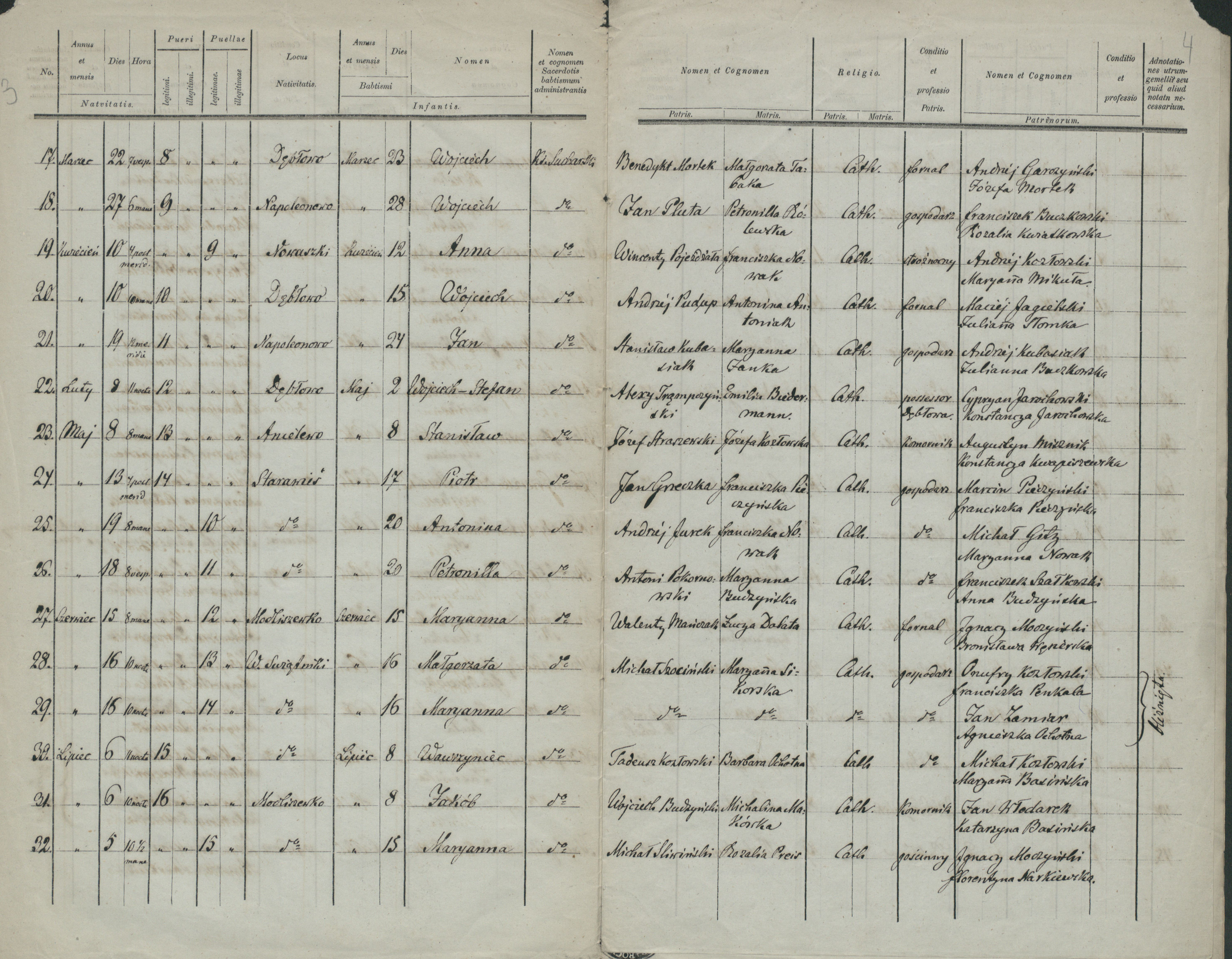 numer 22